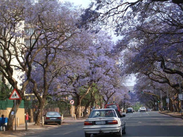 Jakarandabome in Pretoria se middestad